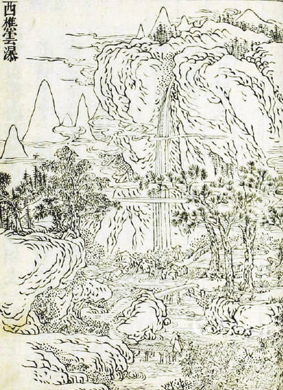 清朝乾隆年间“羊城八景”之一“西樵云瀑”木刻画，出自仇巨川所著《羊城古钞》